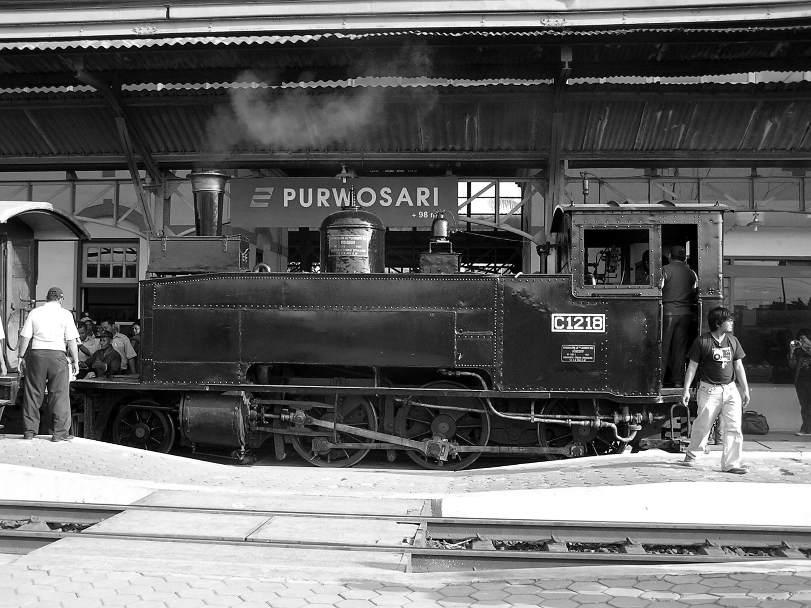 C1218 berhenti di purwosari untuk selanjutnya menuju solo kota